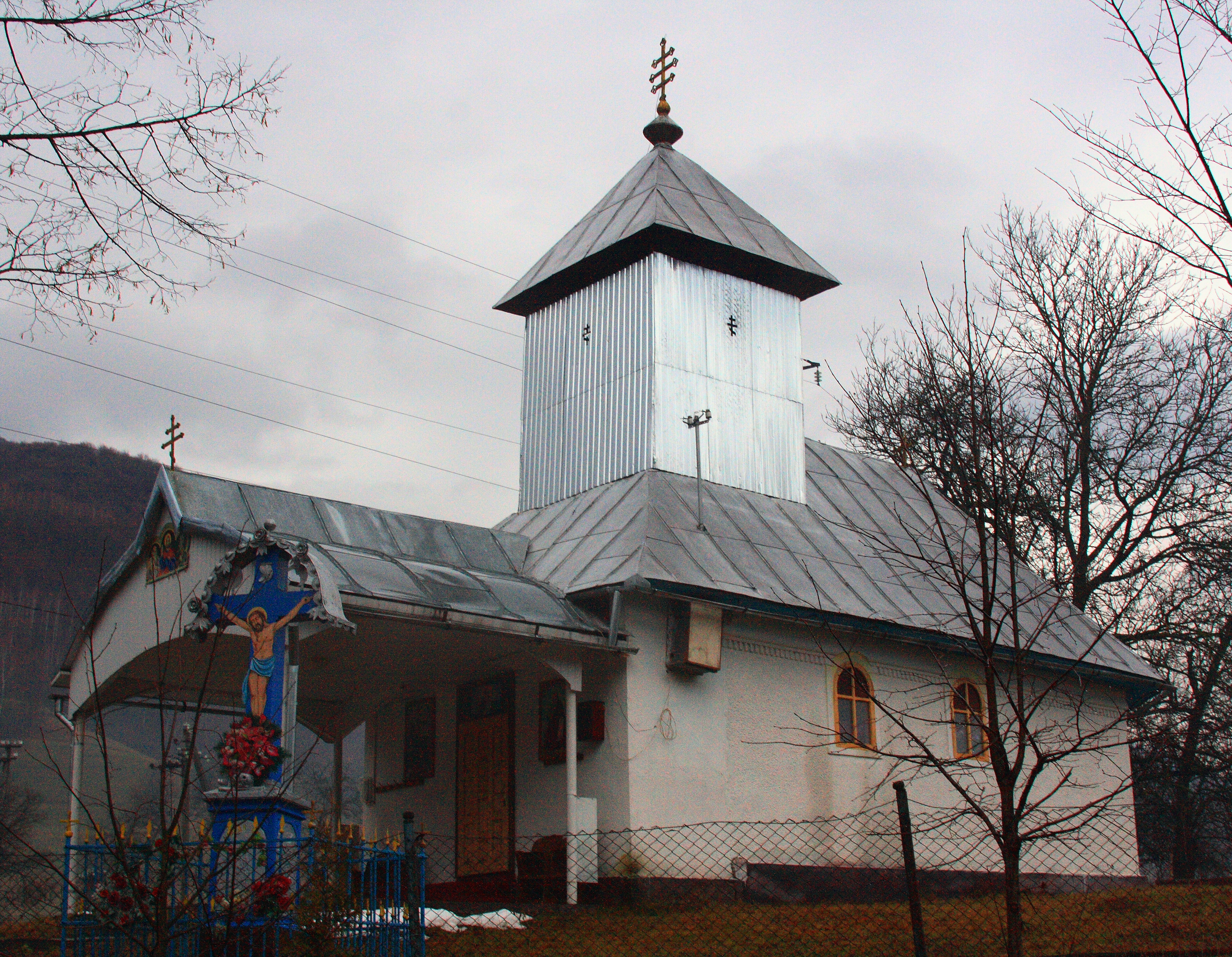 Церковь Св. Ильи в селе Кострина Ростока на Закарпатье.